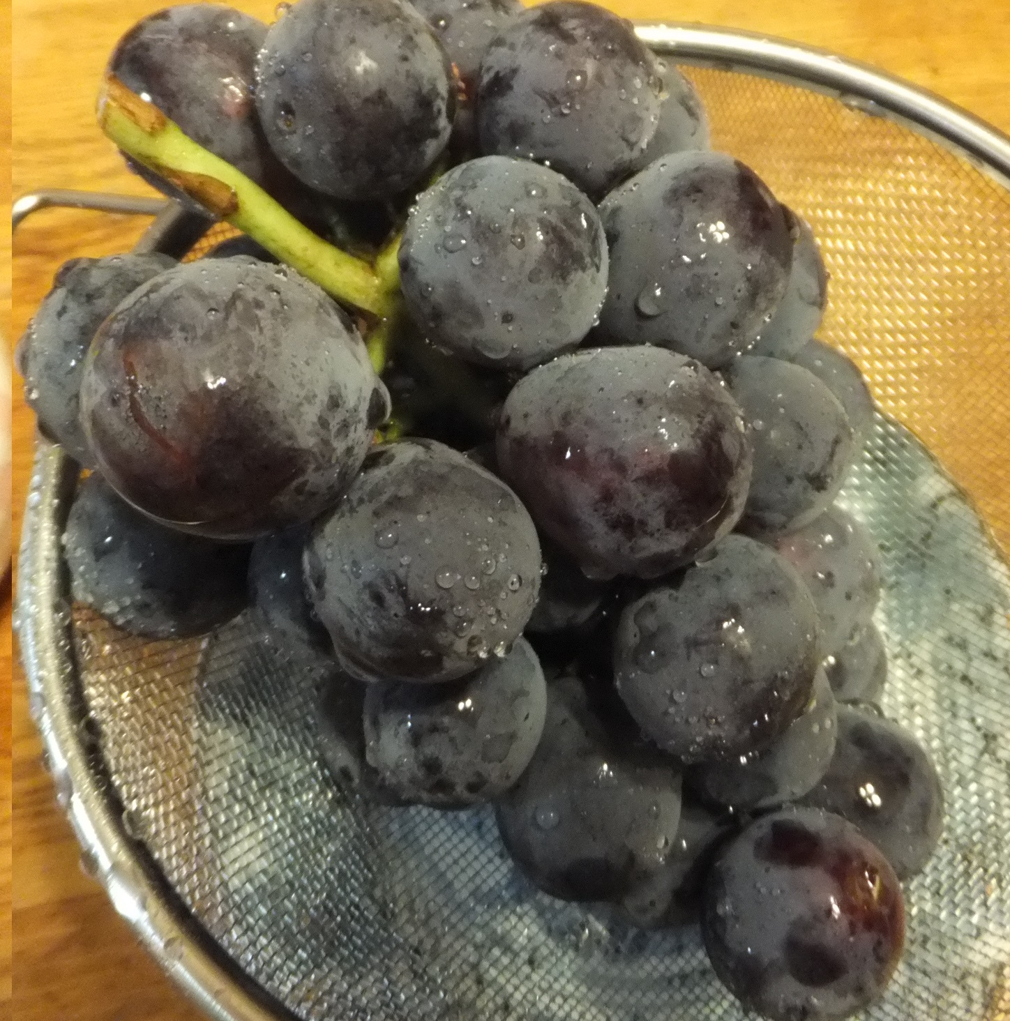 三木ピオーネ